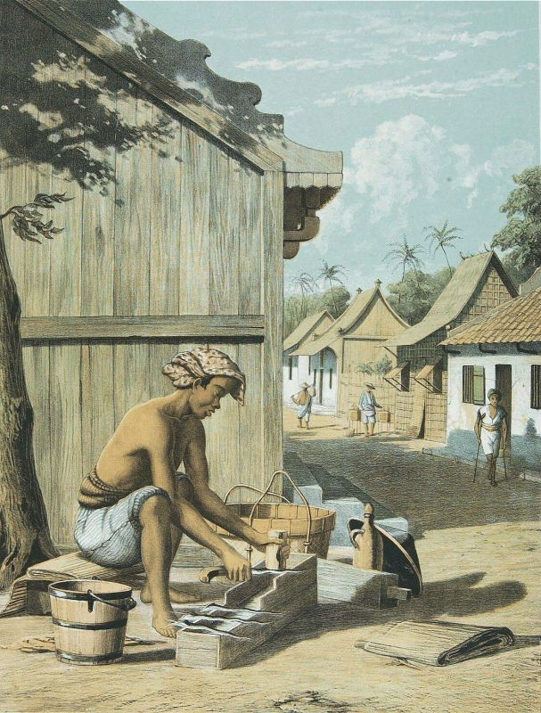 Litho. Litho naar een oorspronkelijke tekening van A. van Pers. Serie van losse gelithografeerde platen.. Een Javaan bezig met het vervaardigen van krissen